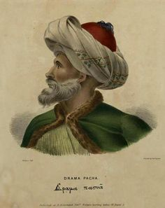 Mahmud Dramali Pasha